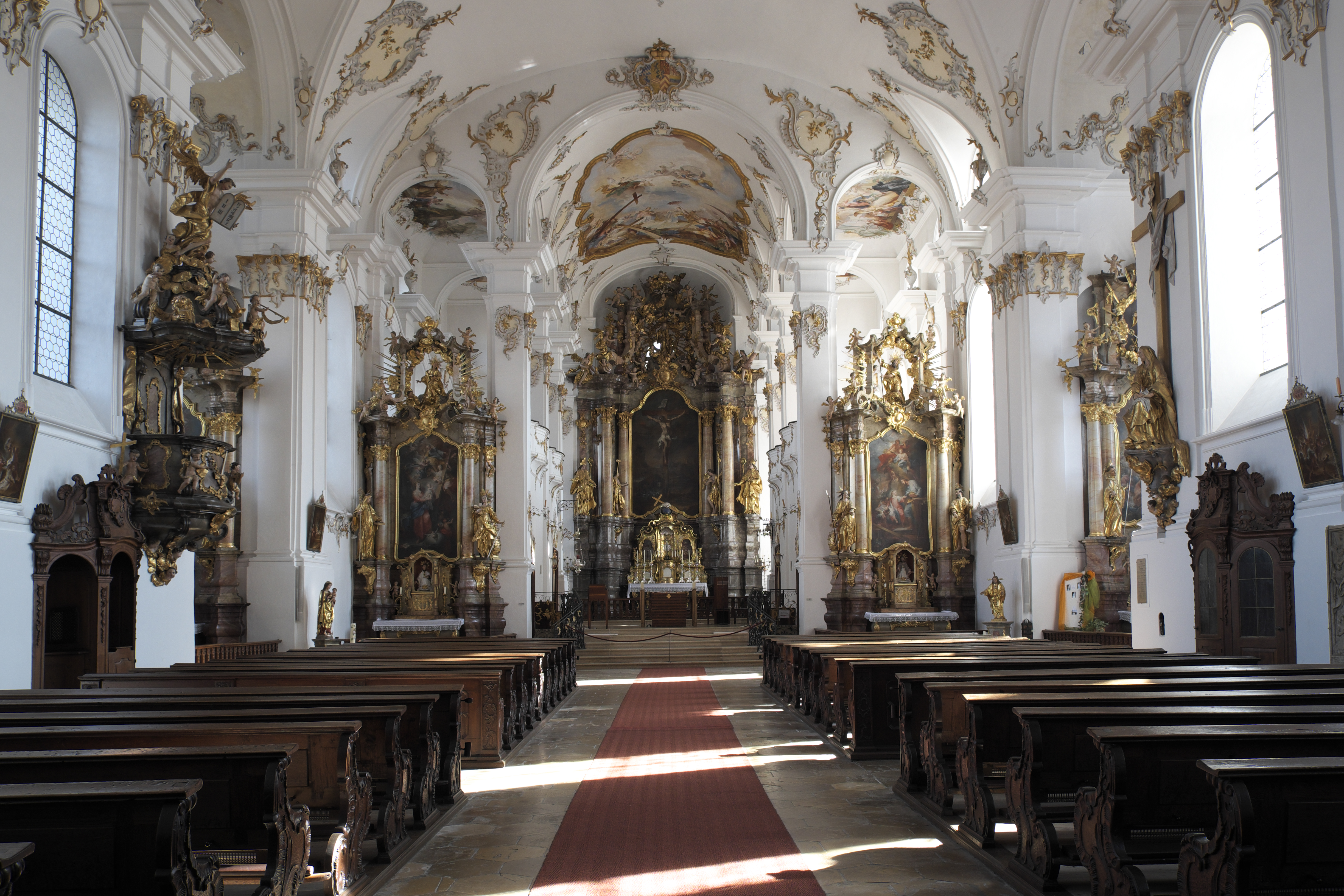 Wallfahrtskirche Heilig Kreuz, ehemalige Klosterkirche des Klosters Bergen in Bergen, einem Ortsteil von Neuburg an der Donau im Landkreis Neuburg-Schrobenhausen (Bayern), Innenraum